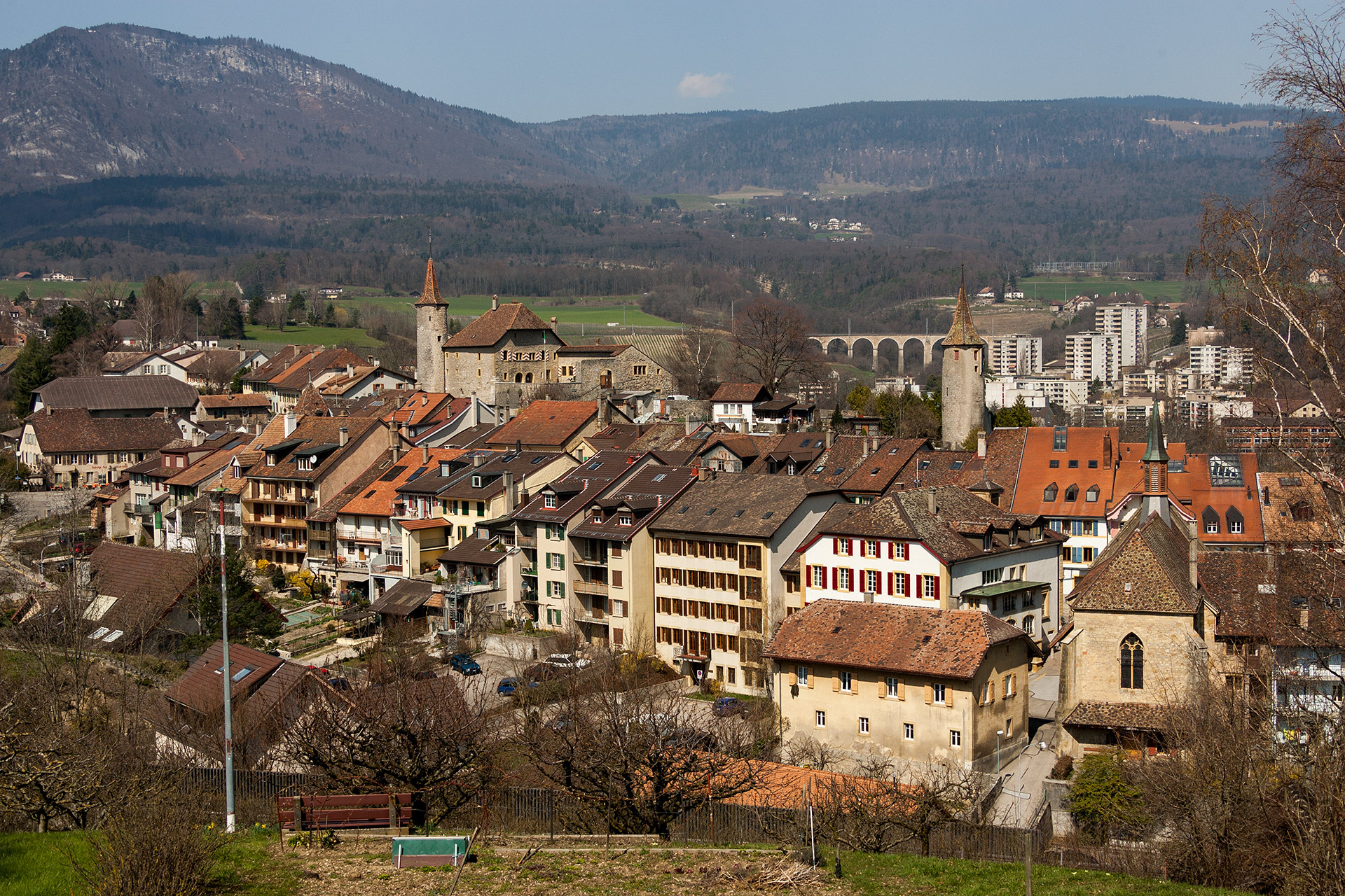 Blick auf Boudry (NE)